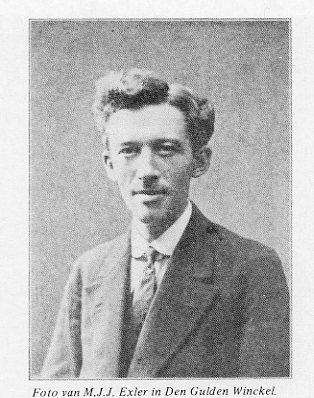 Marie Jacobus Johannes Exler (1882 - 1939) op zijn 29ste.